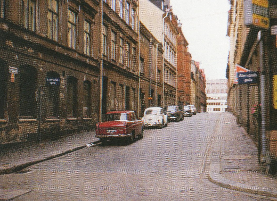 Norra Smedjegatan, sedd mot norr från Herkulesgatan